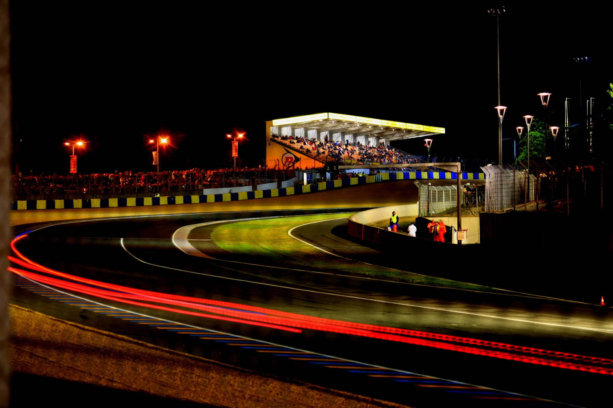 Prise à 23 H avant d'aller dormir avec les paramètres suivants : Vitesse : 2 sec Focal : 170 mm AF Continue Ouverture : F5,6 C'est dans ces conditions que le capteur plein format donne ses meilleurs résultats comme ici sans retouche .